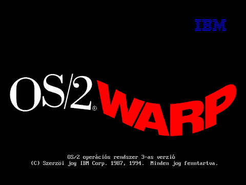 IBM OS/2 Warp Connect 3.0 magyar bétaváltozat, boot képernyő. "Az IBM Magyarország Kft. melléklete az Új Alaplap 1996. áprilisi számához"